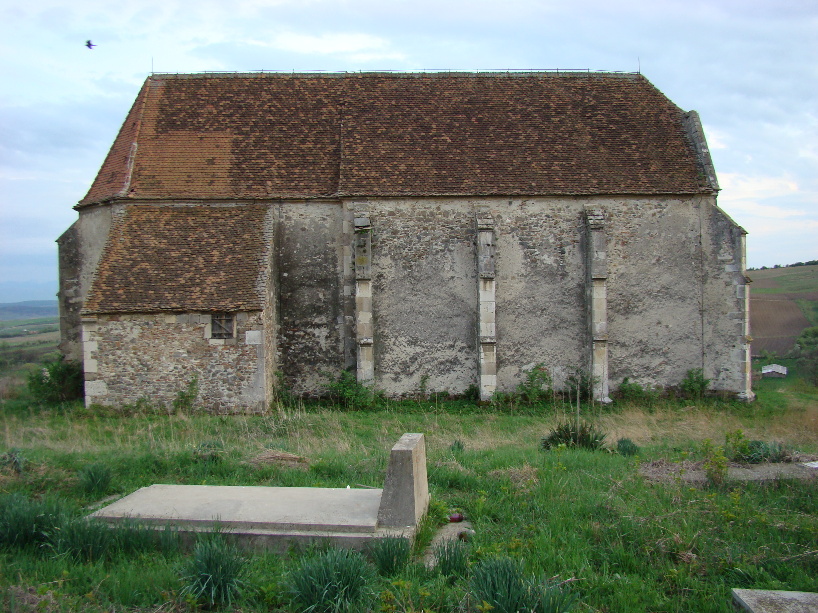 Evangelische Kirche von Vingard (Weingartskirchen), Alba, Siebenbürgen, Rumänien